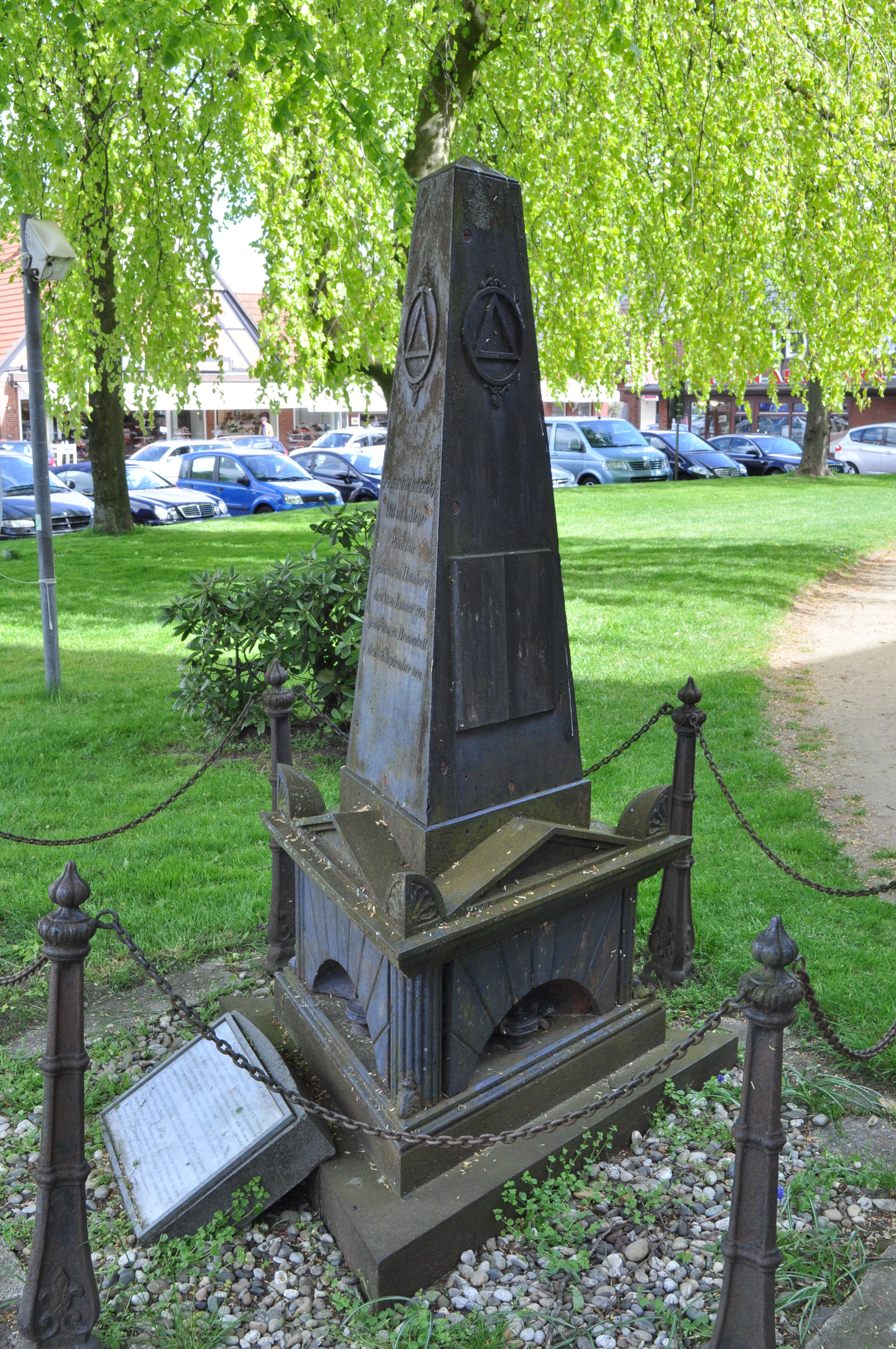 Grabmal von Friedrich Ludwig Wilhelm Meyer auf dem Kirchhof der Maria-Magdalenen-Kirche in Bad Bramstedt. Das Grabmal steht wie alle anderen vor 1870 errichteten Grabmale des Kirchhofs unter Denkmalschutz, This is a photograph of an architectural monument. .3